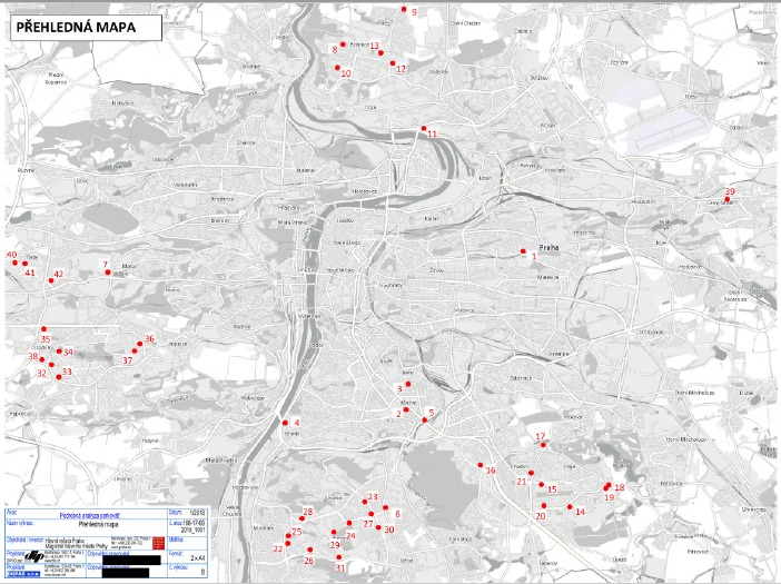 Sídlištní hlídaná parkoviště TSK hl. m. Prahy v Praze.